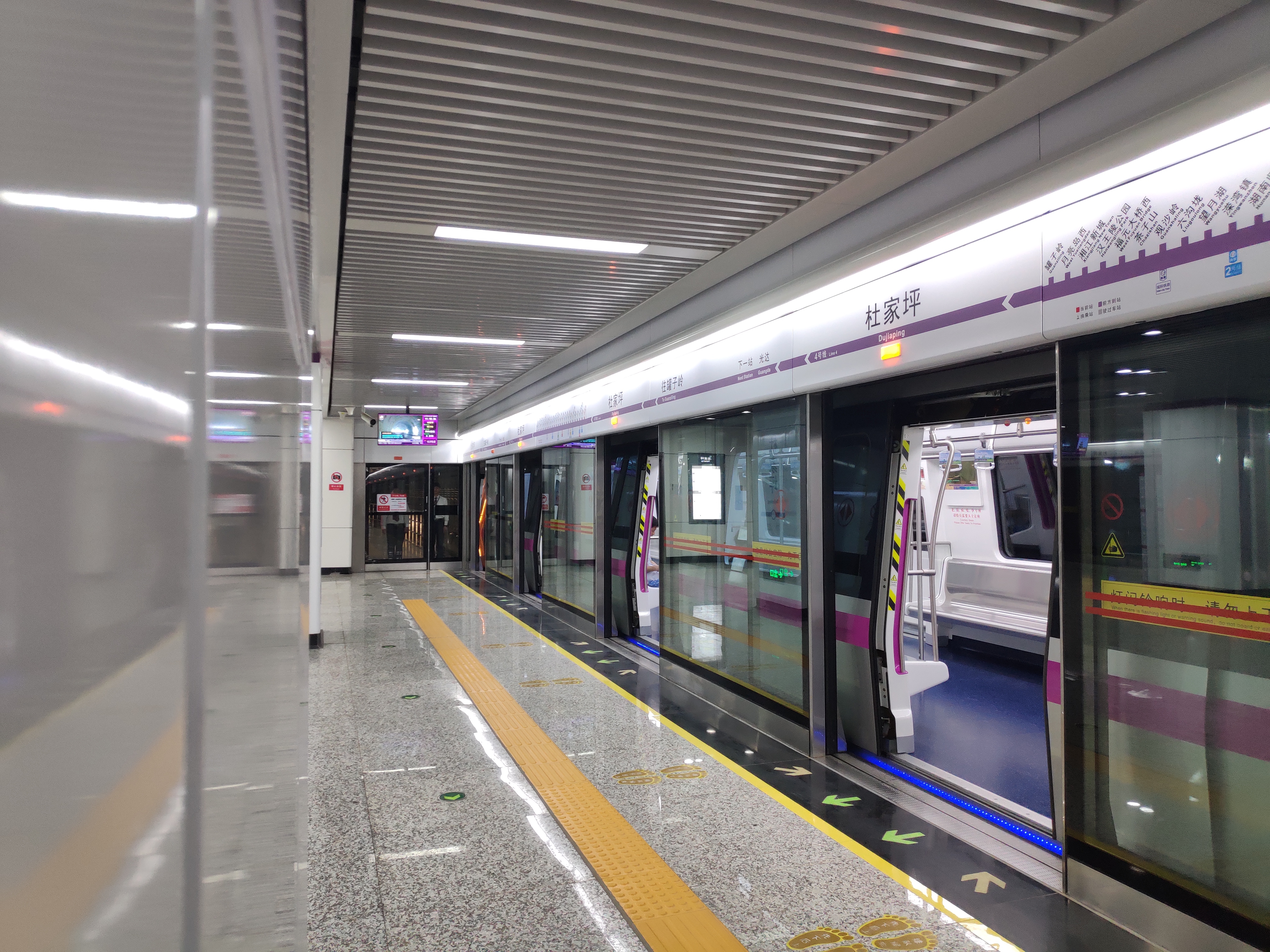 中文（香港）: 停靠在杜家坪站的長沙地鐵4號線的第一班列車